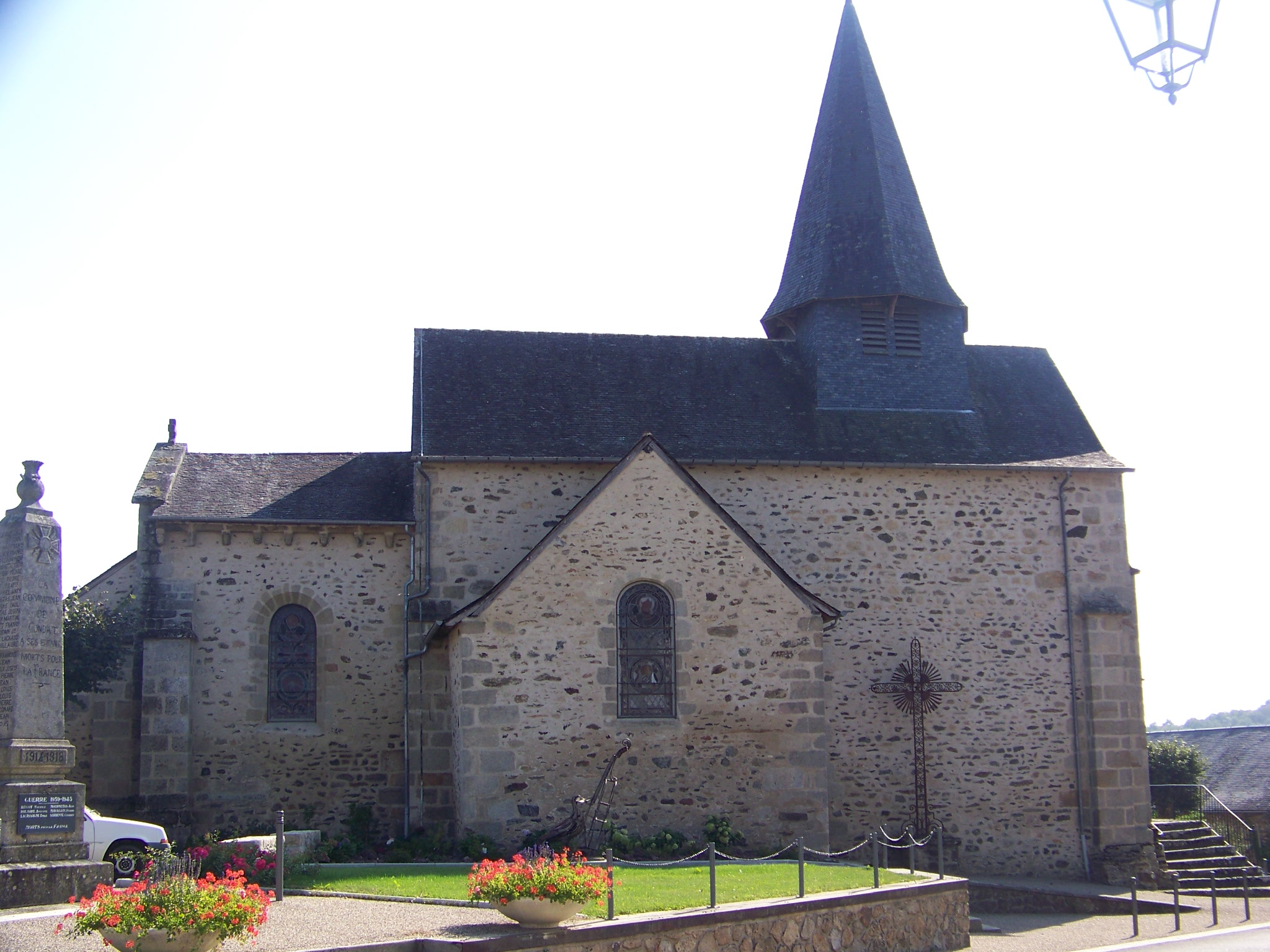 Église Saint-Julien de Brioude à Condat sur Ganaveix (19)